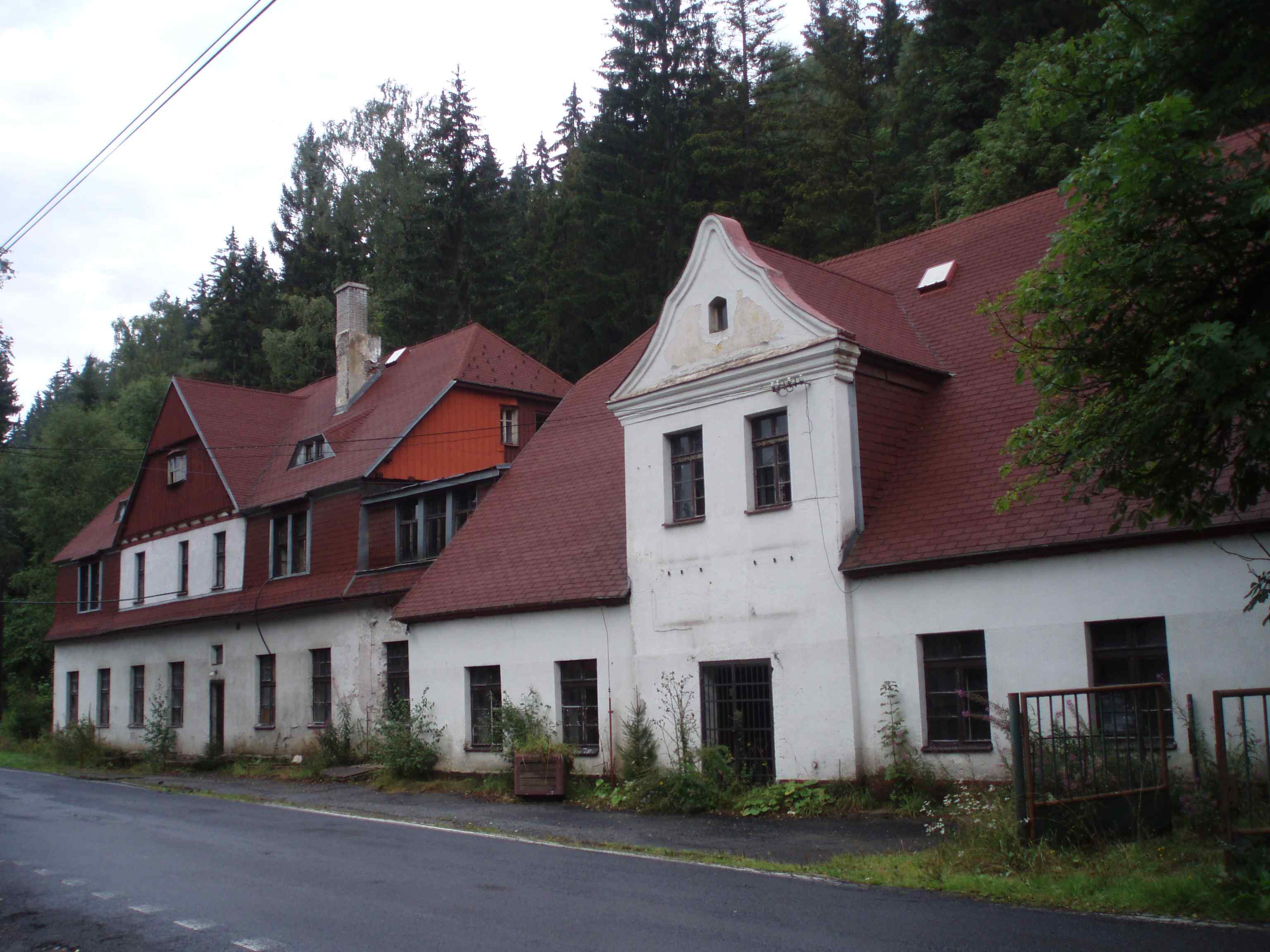 Ruine der Dreckschänke